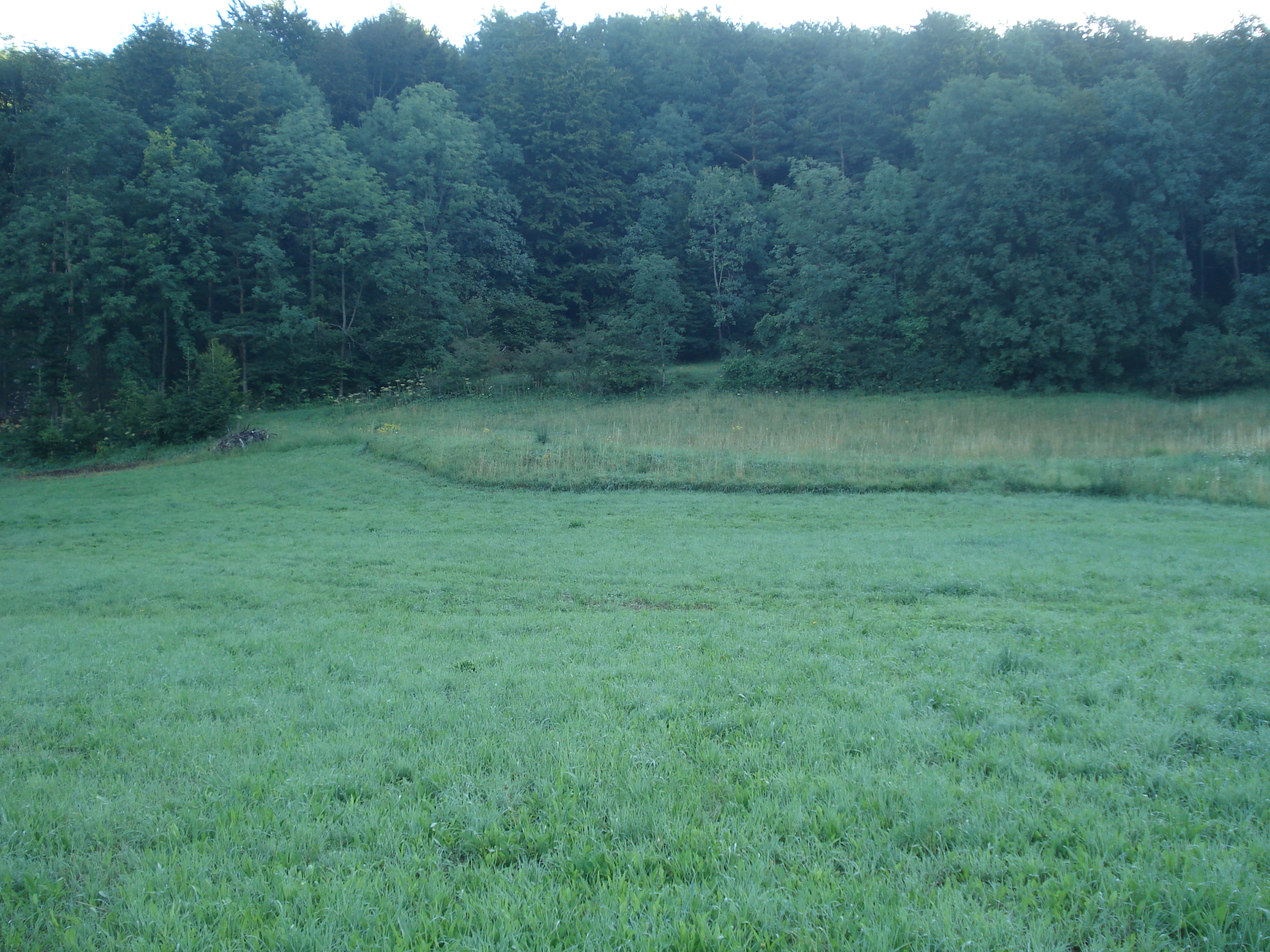 Am Hungerbrunnen Stierfessel